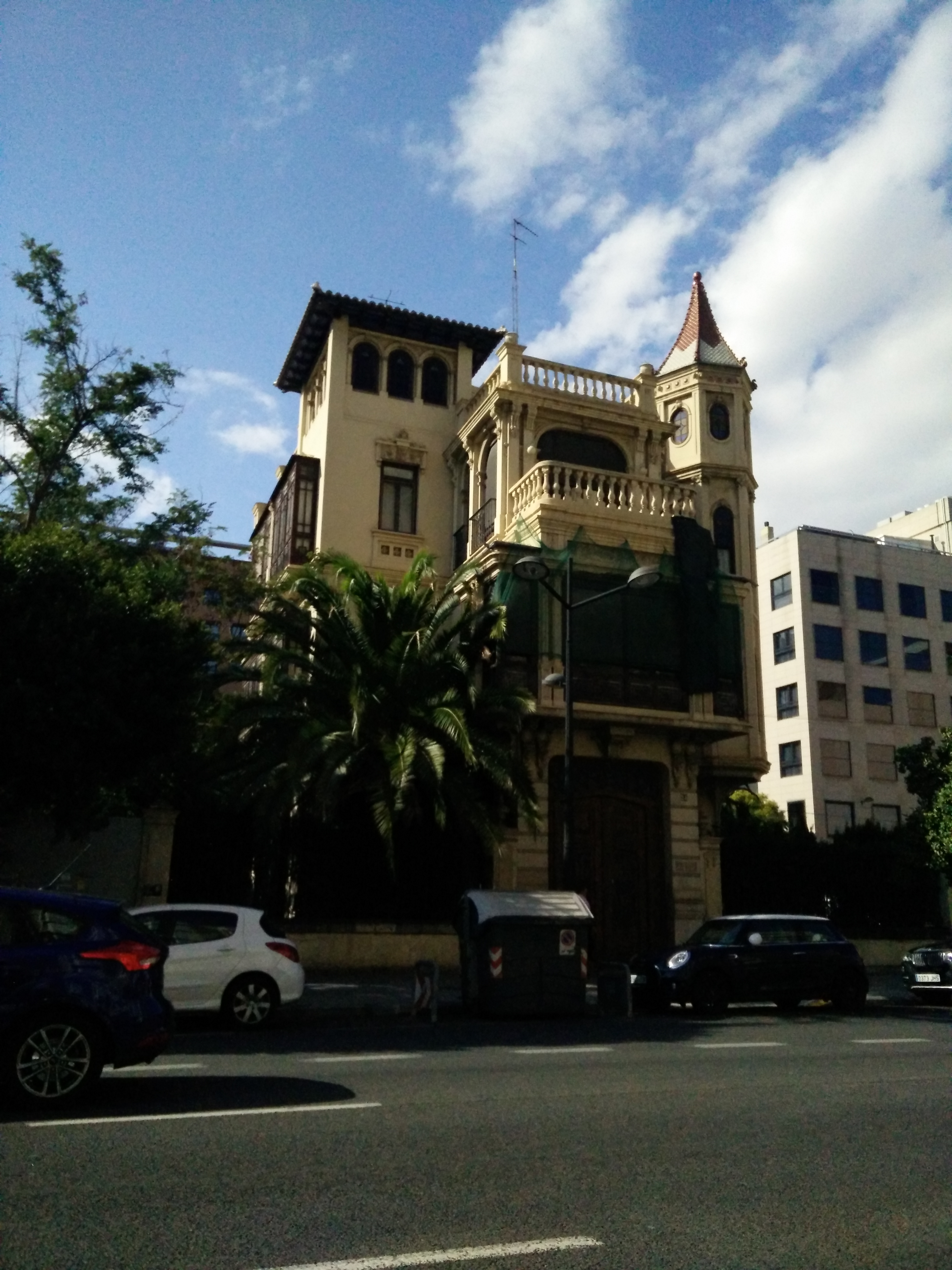 Nucli històric tradicional de l'avinguda del Port del Grau (València) 15.250-363.